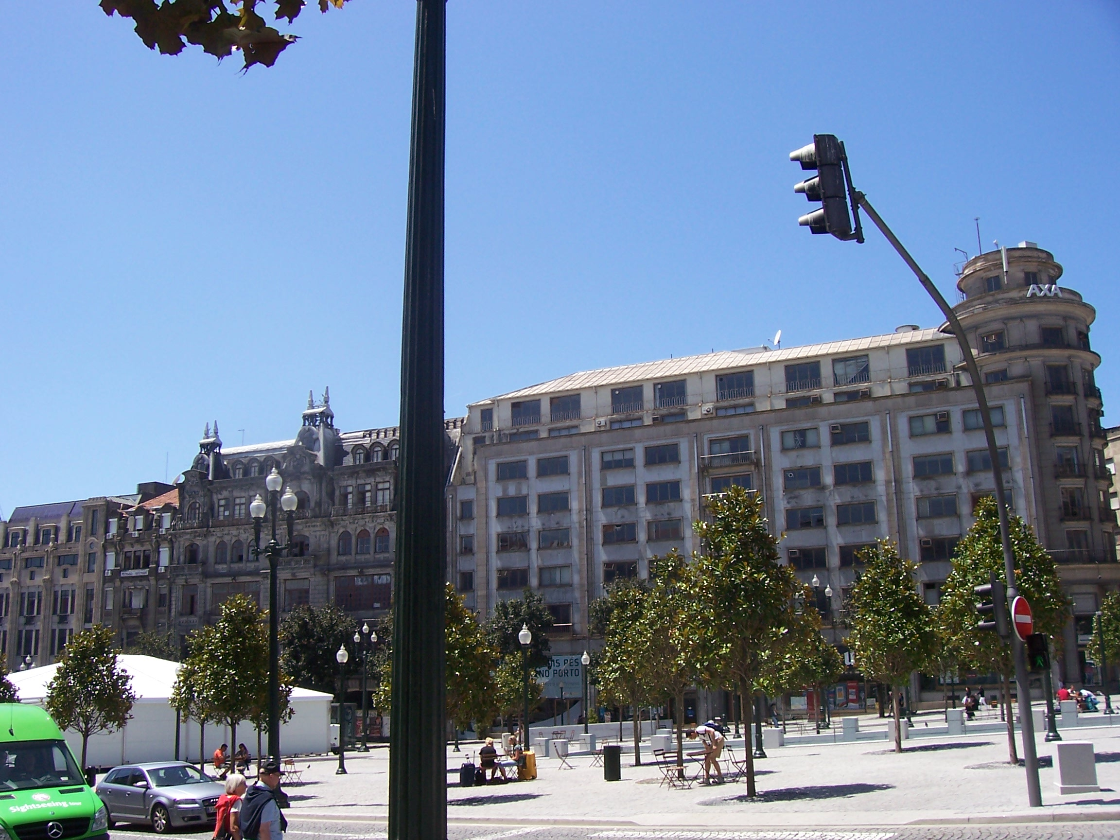 Porto, Portugal